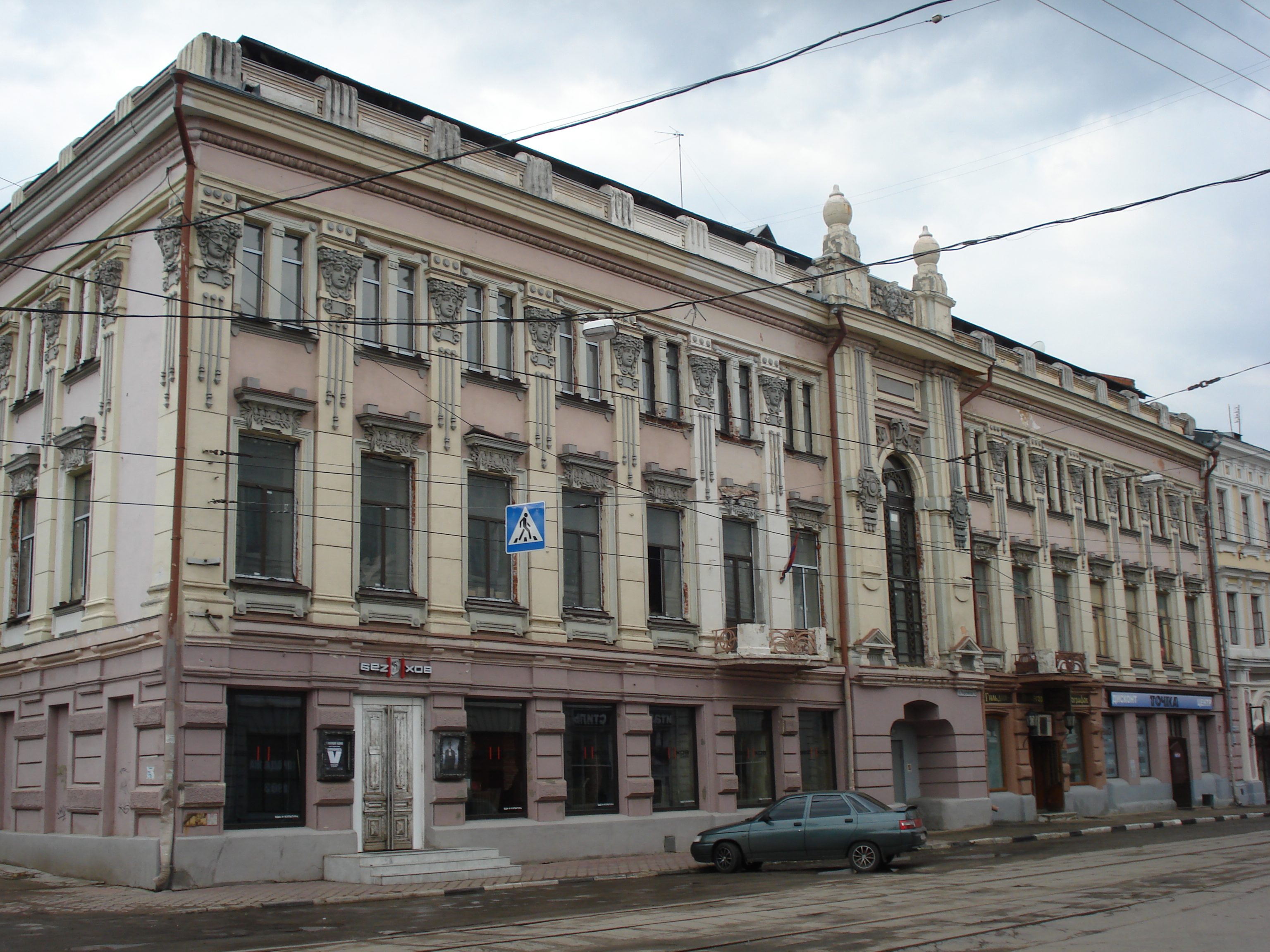 бывший Городской общественный дом (Нижний Новгород, Рождественская, д.6)